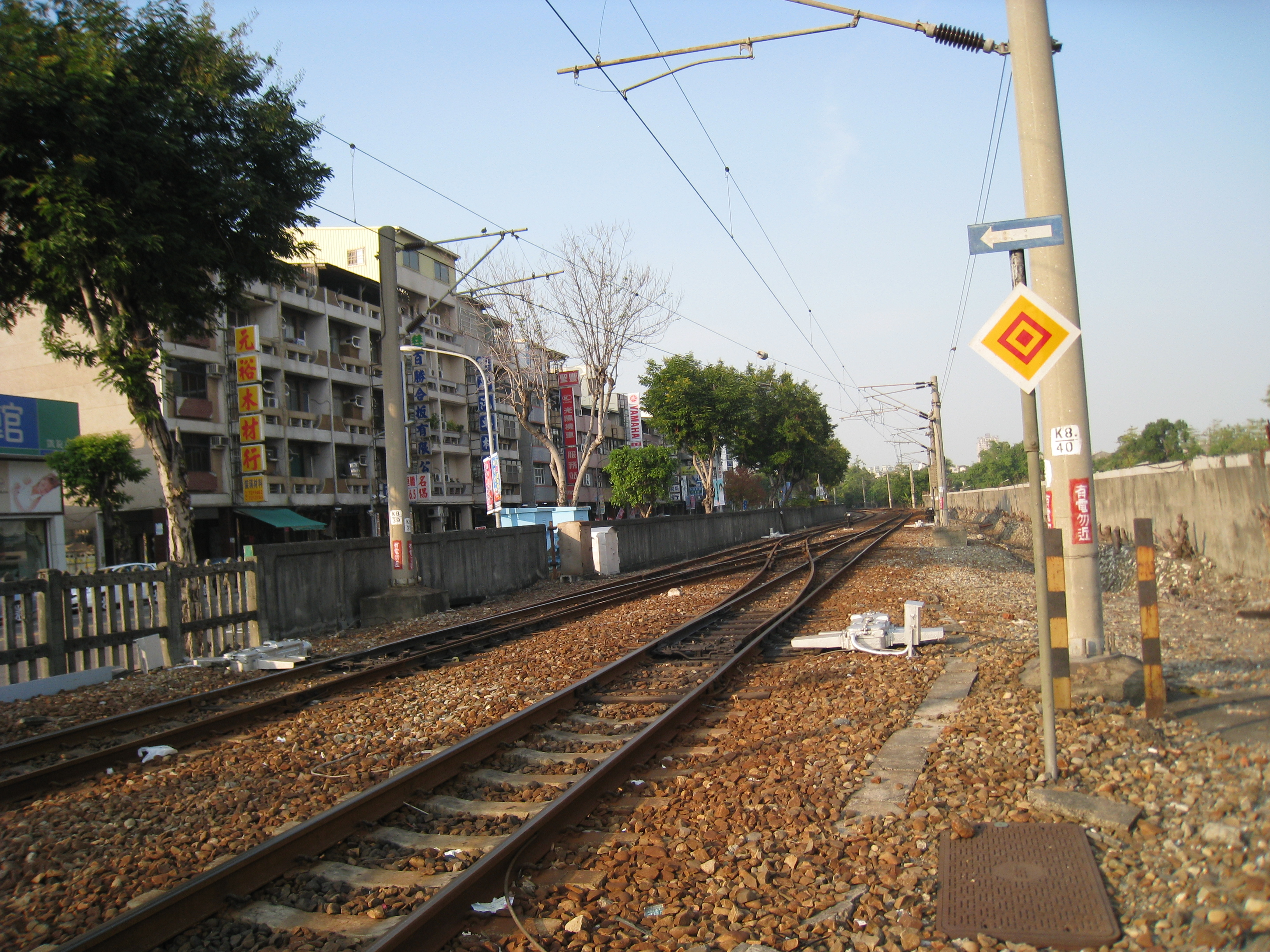 臨港線